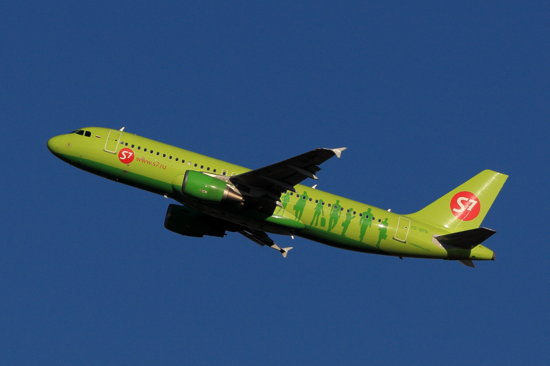 成田国際空港で撮影された、S7航空のエアバス A320-200型機